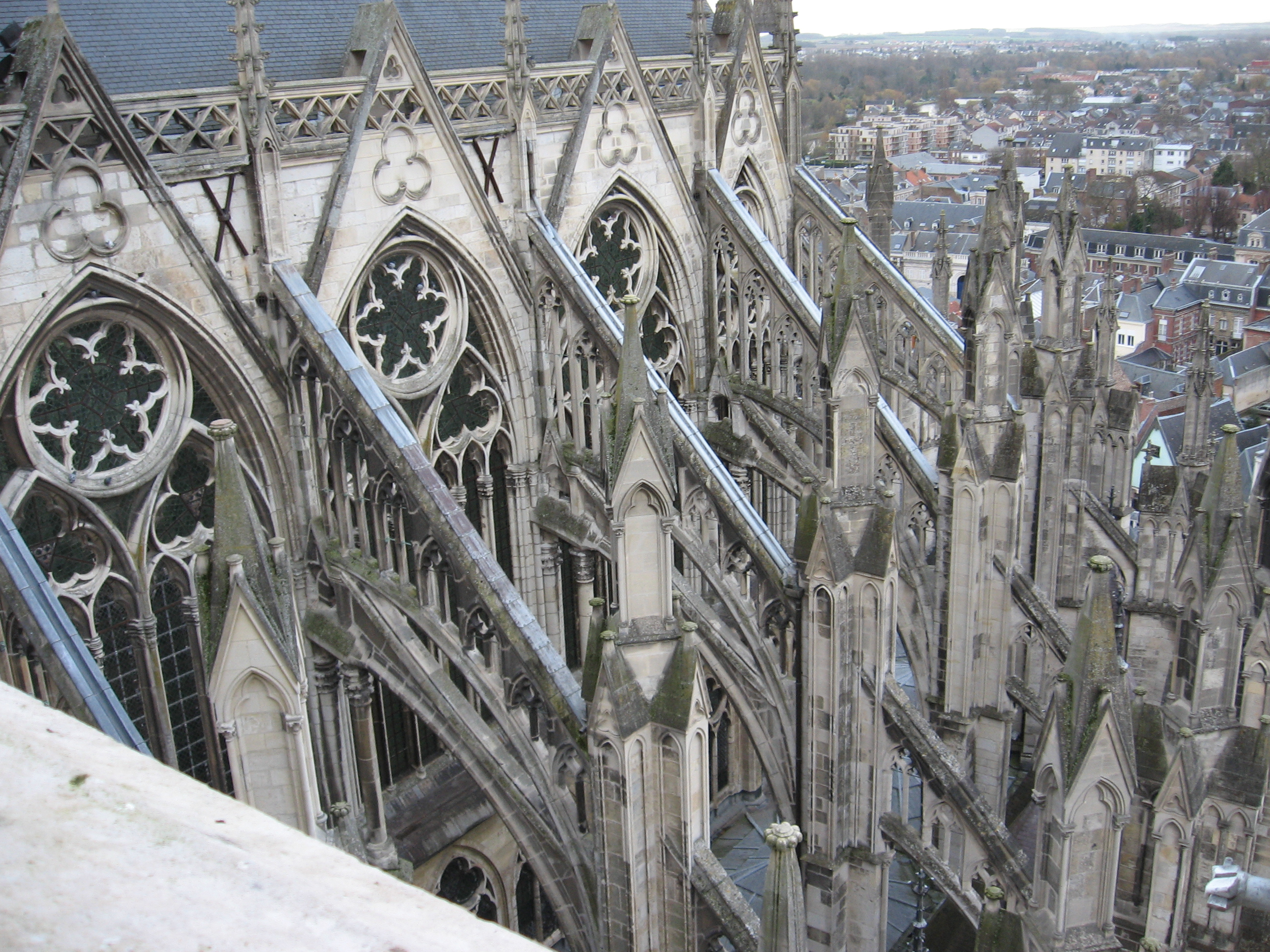 Amiens Cathédrale Notre-dame arc-boutant sud-est 4 .